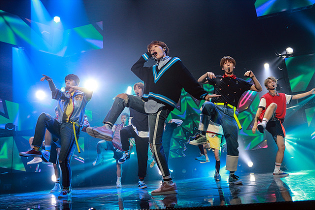 09월 26일 뮤콘 쇼케이스 MUCON Showcase 골든차일드(Golden Child)